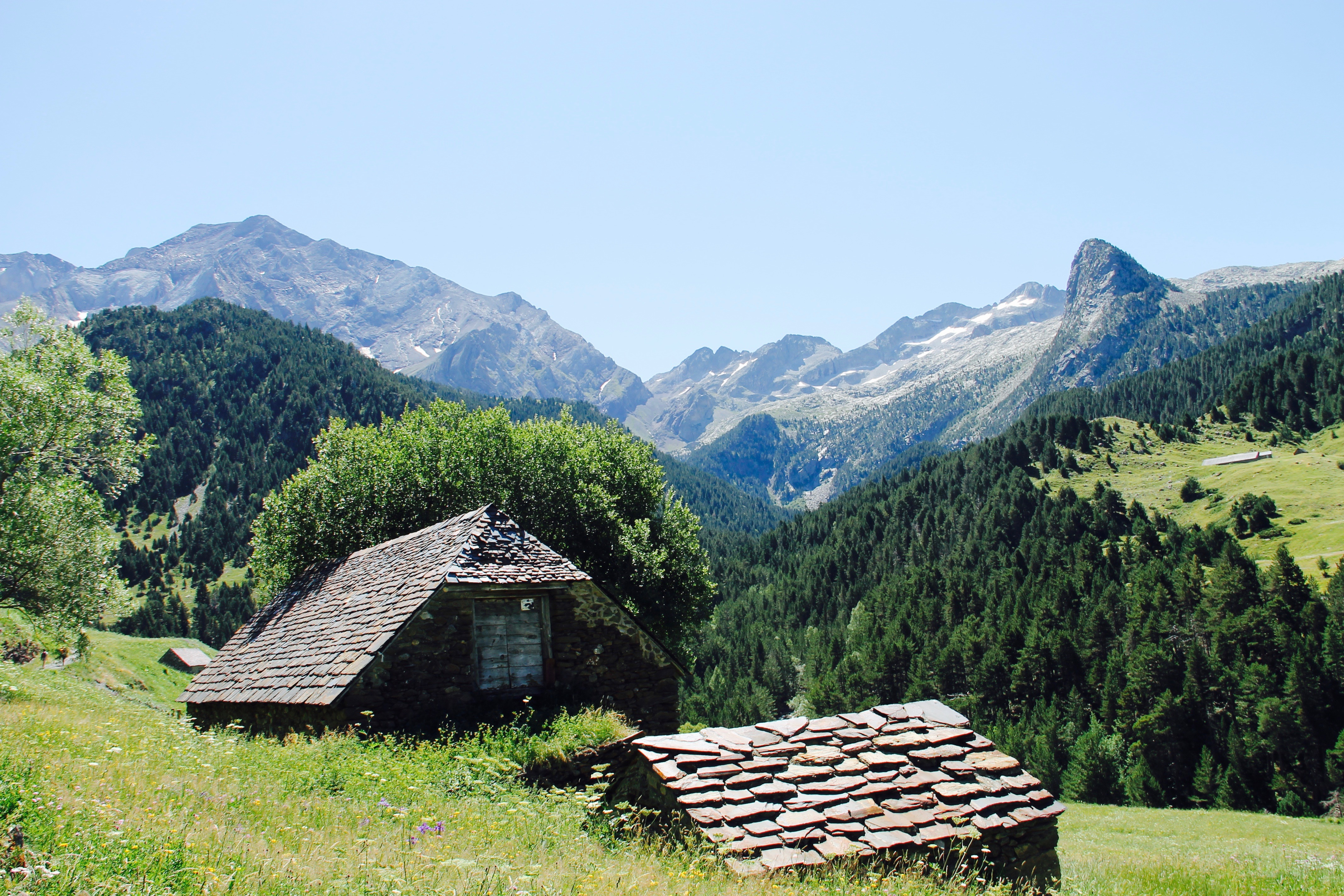 Posets - Maladeta This is a photography of a Special Area of Conservation in Spain with the ID: ES0000149. Natura2000 entry, EEA entry